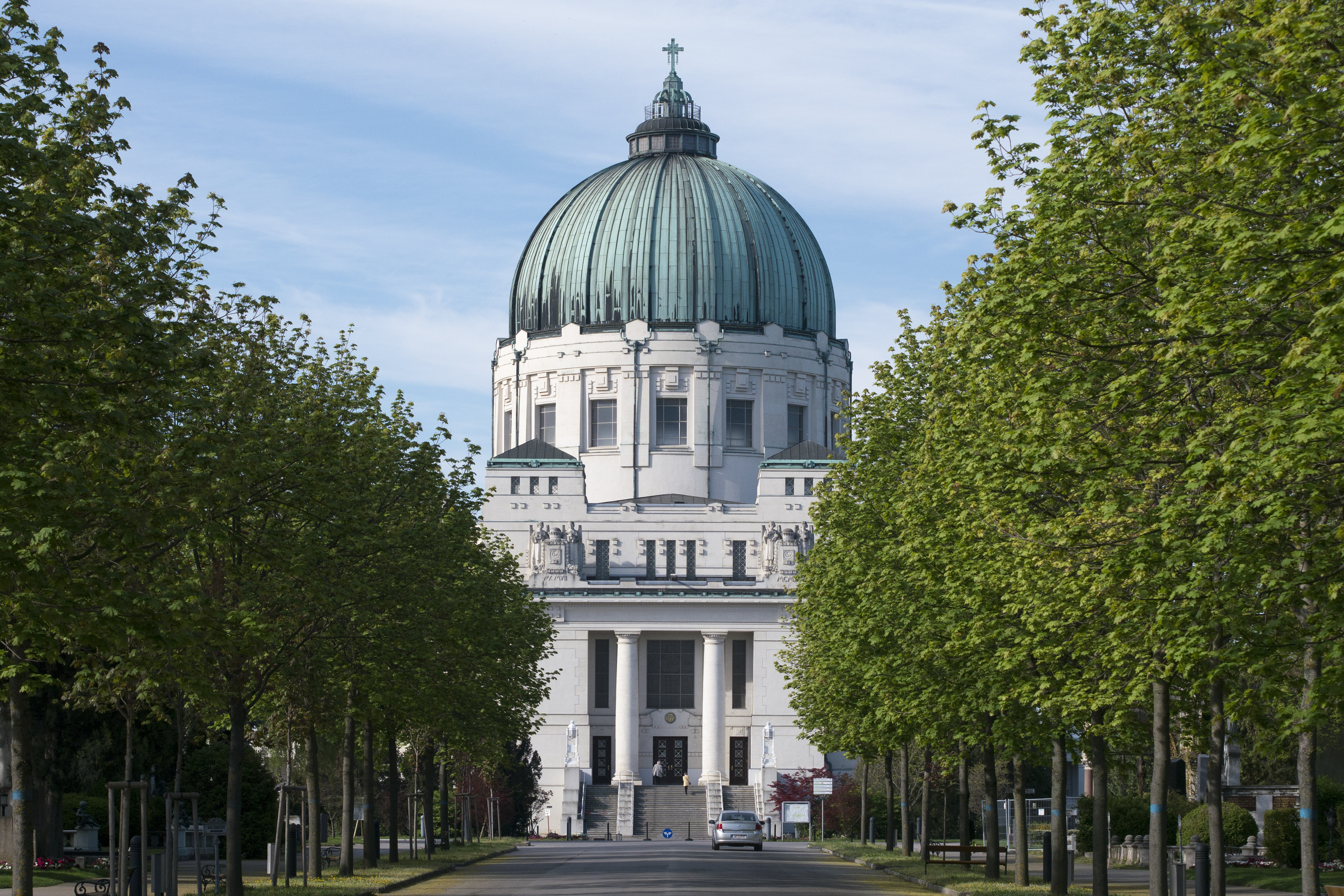 Karl Lueger Kirche